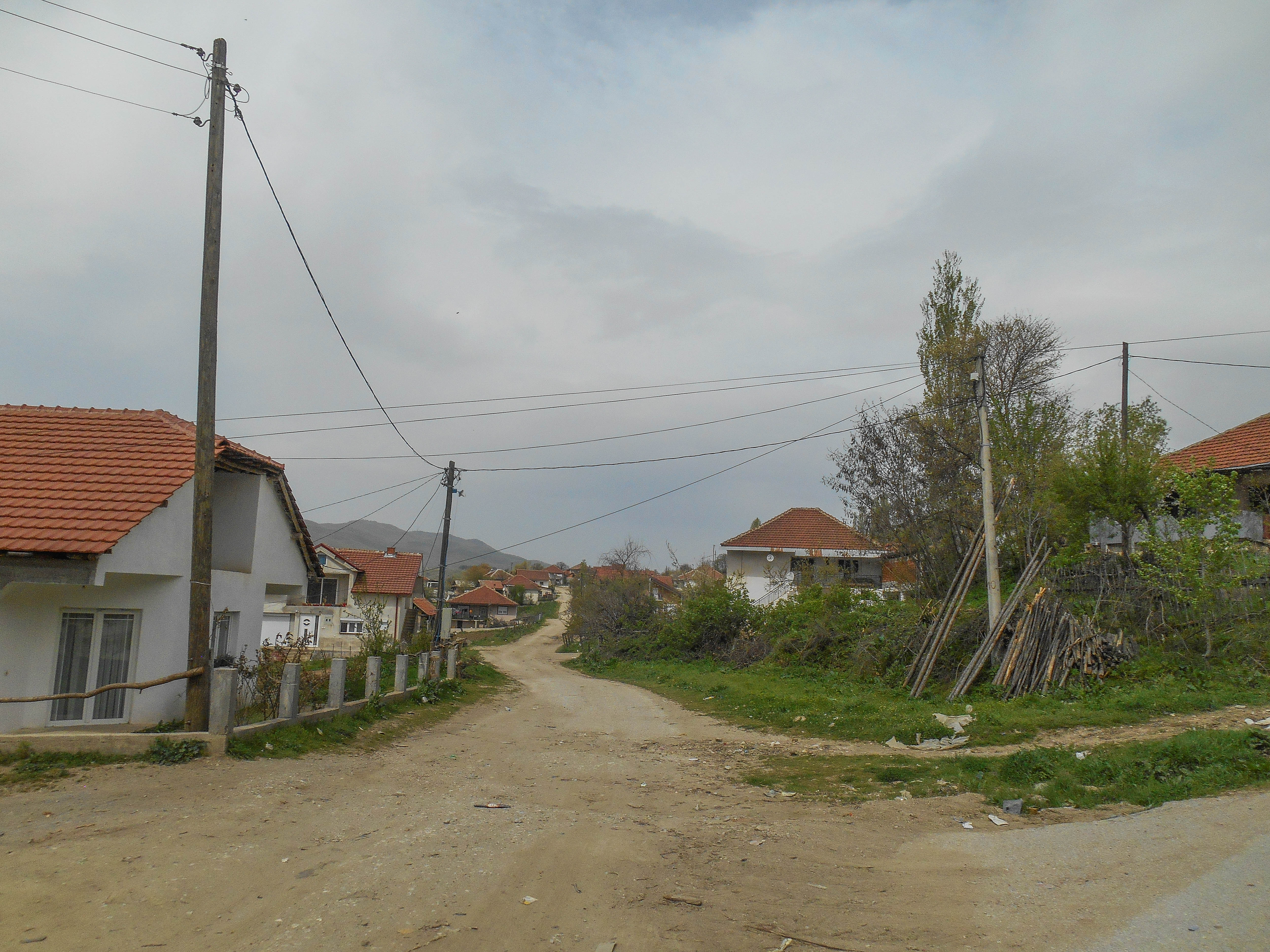 Рич Струмица